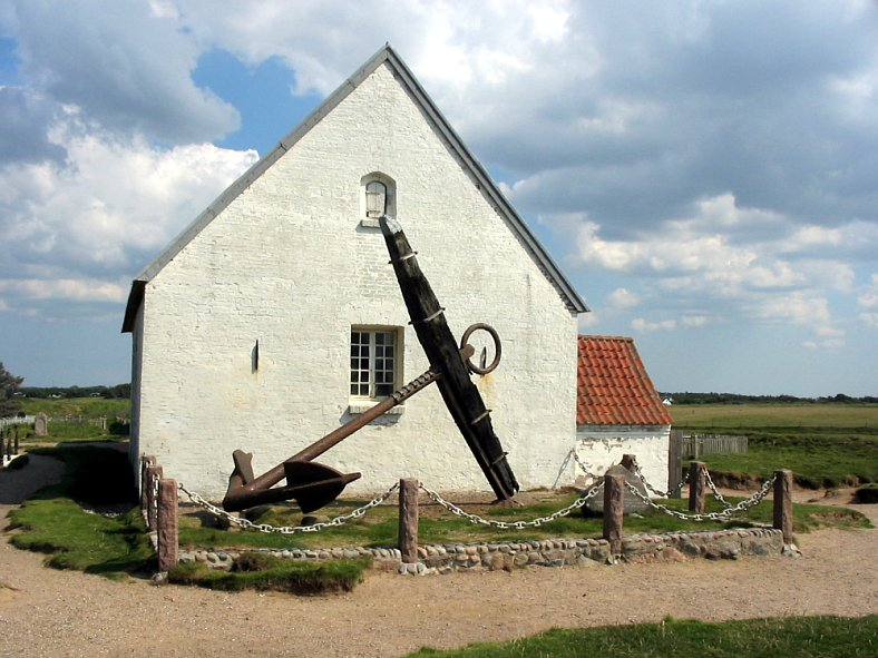 Mårup Kirke, Lønstrup